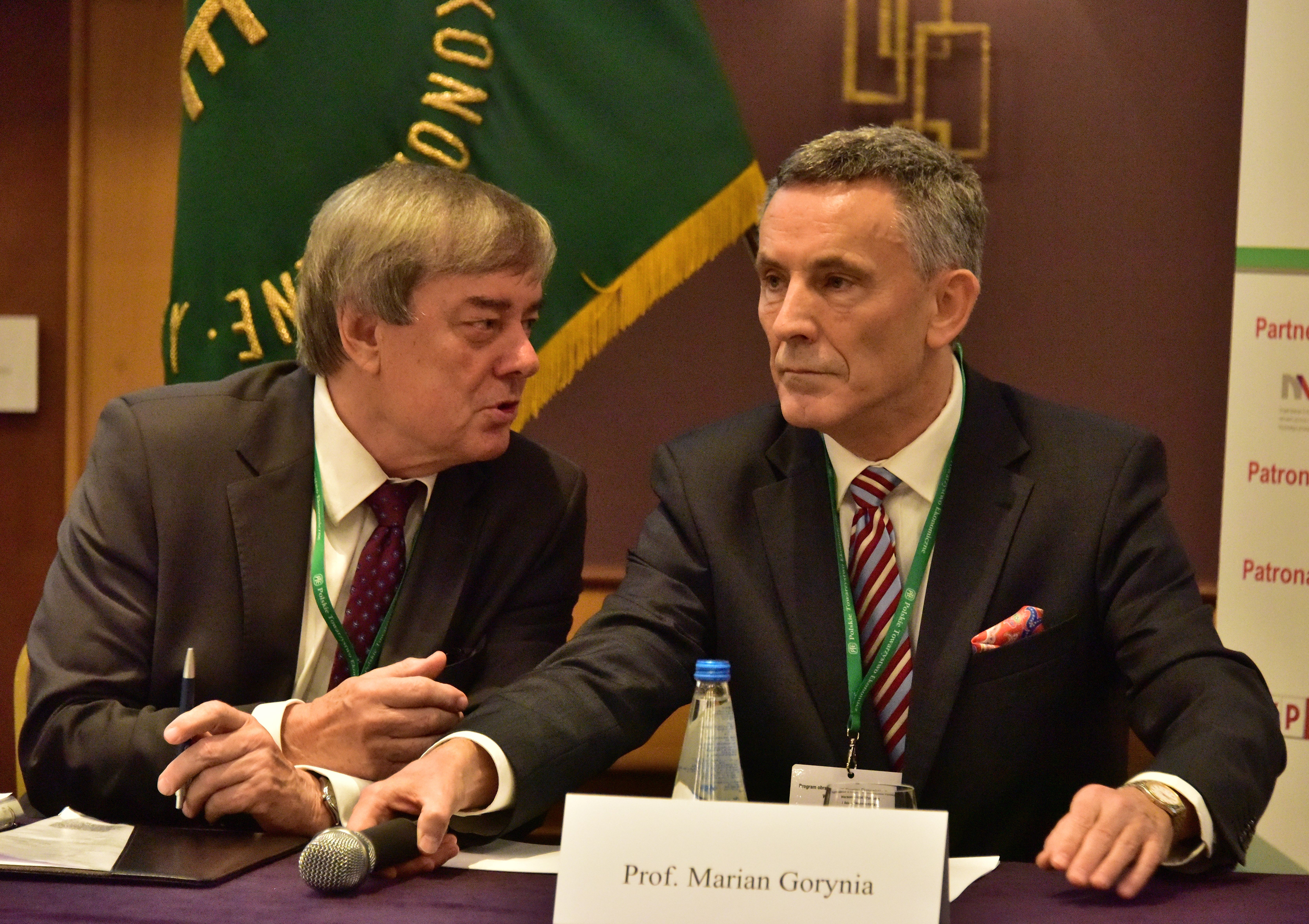 Profesowie Bogusław Fiedor Marian Gorynia podczas X Kongresu Ekonomistów Polskich w hotelu Sheraton w Warszawie